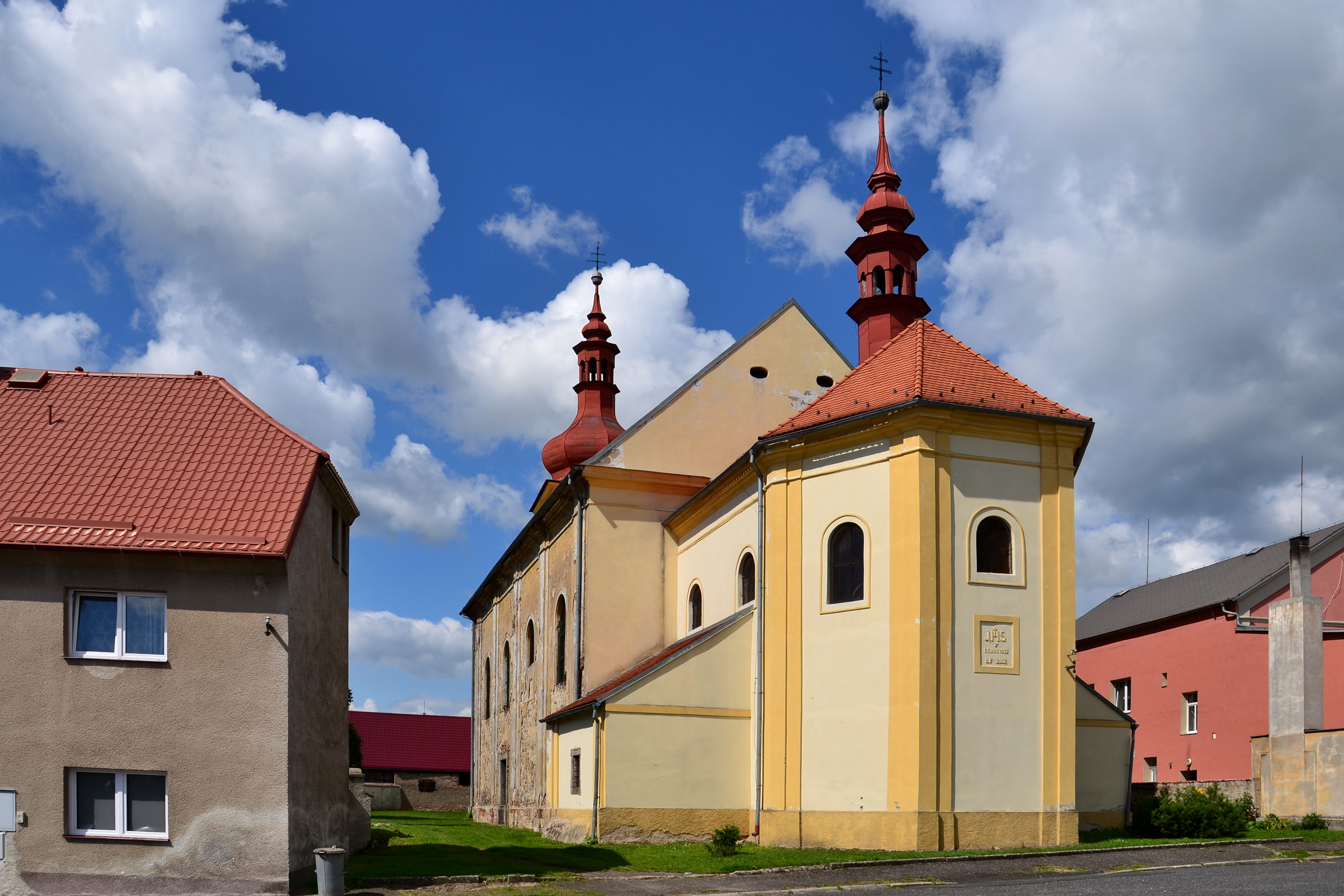 Kostel Narození Panny Marie, Radonice (okres Chomutov).